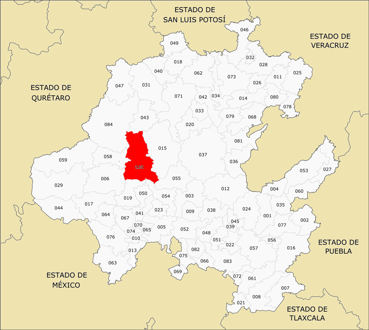 Municipios de Hidalgo